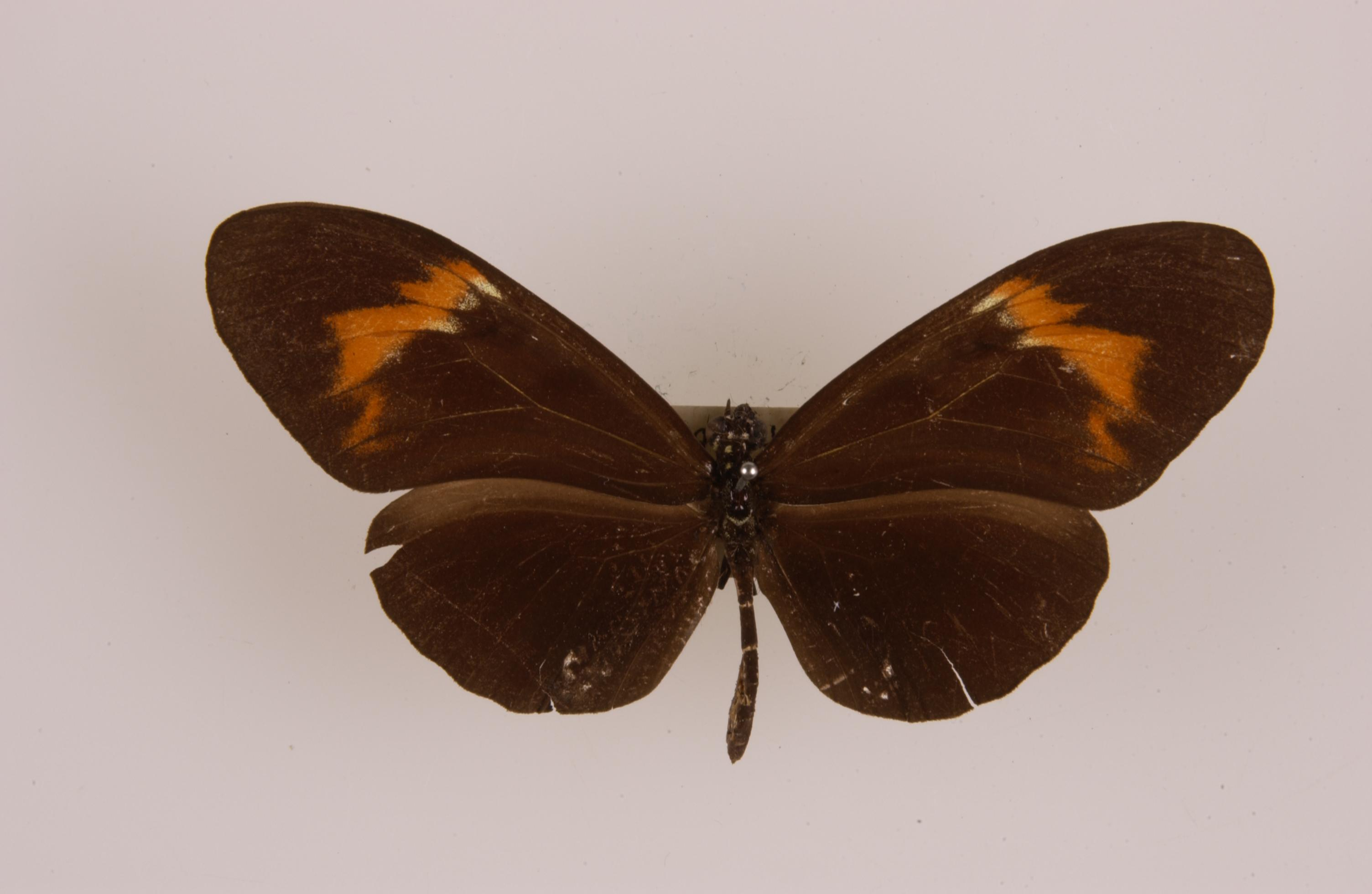 Heliconius heurippa rubellius